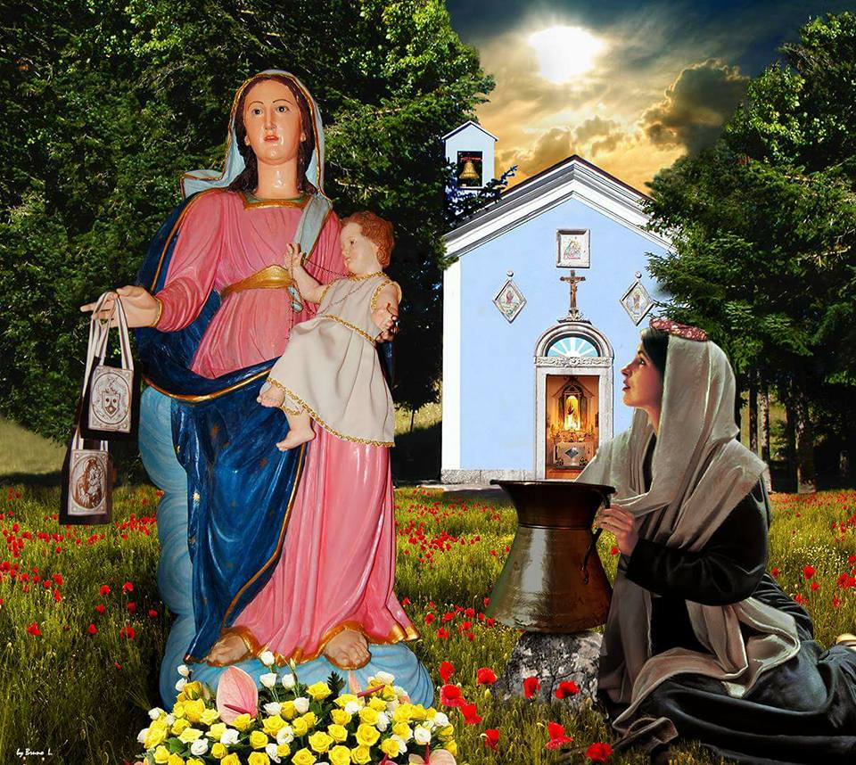 santuario dell'apparizione di Acquafondata (Fr)